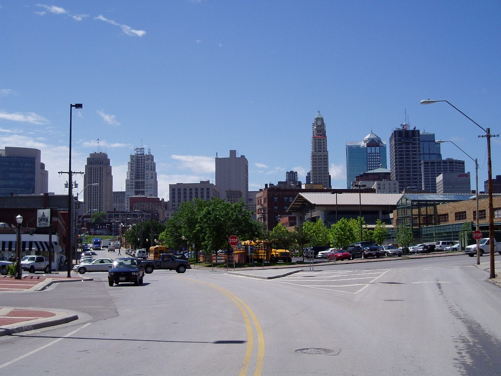 Kansas City / Im Vordergrund rechts das sehenswerte Arabia Steamboat Museum für das von Privatleuten aus dem Schlamm des Missouris freigelegte Dampfschiff Arabia. Es war am 6. September 1856 gesunken, nachdem sein Rumpf durch einen versunkenen Baumstumpf aufgerissen wurde.